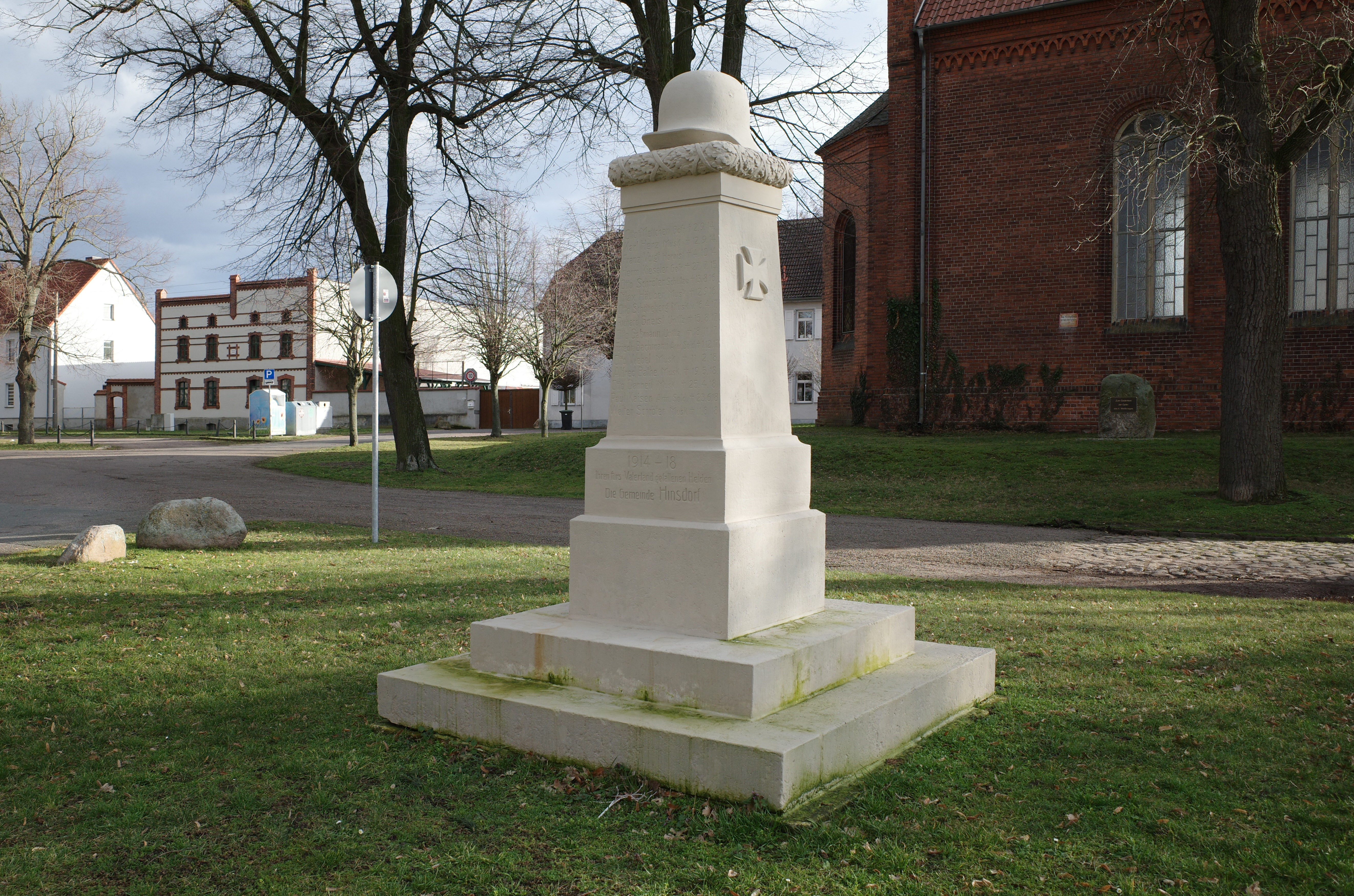 Südliches Anhalt, Ortsteil Hinsdorf. Das 2019 [1] sanierte Denkmal für die Gefallenen des Ersten Weltkrieges und der Gedenkstein für die Opfer des zweiten Weltkrieges an der Kirche.